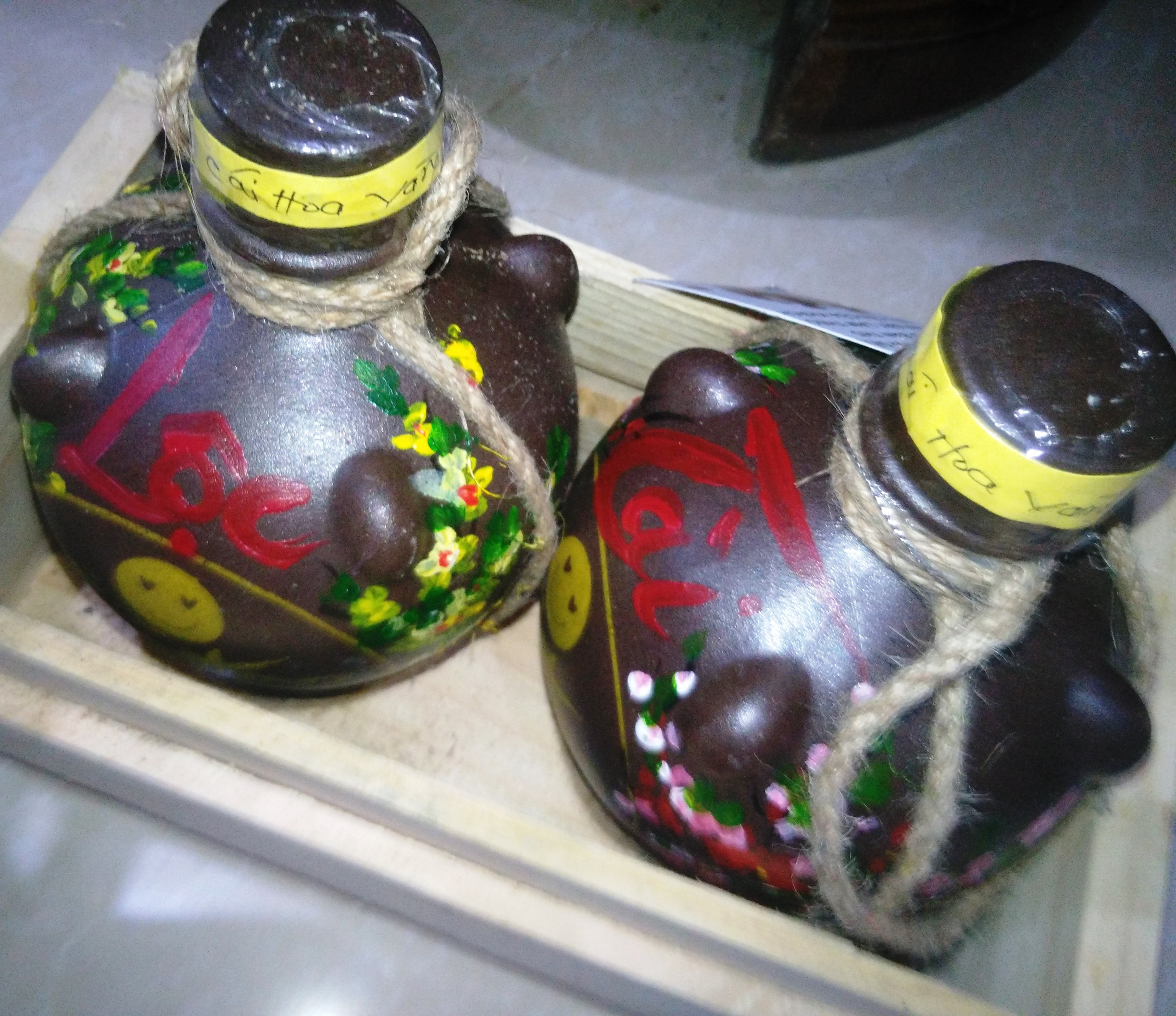 Cuisine of Vietnam